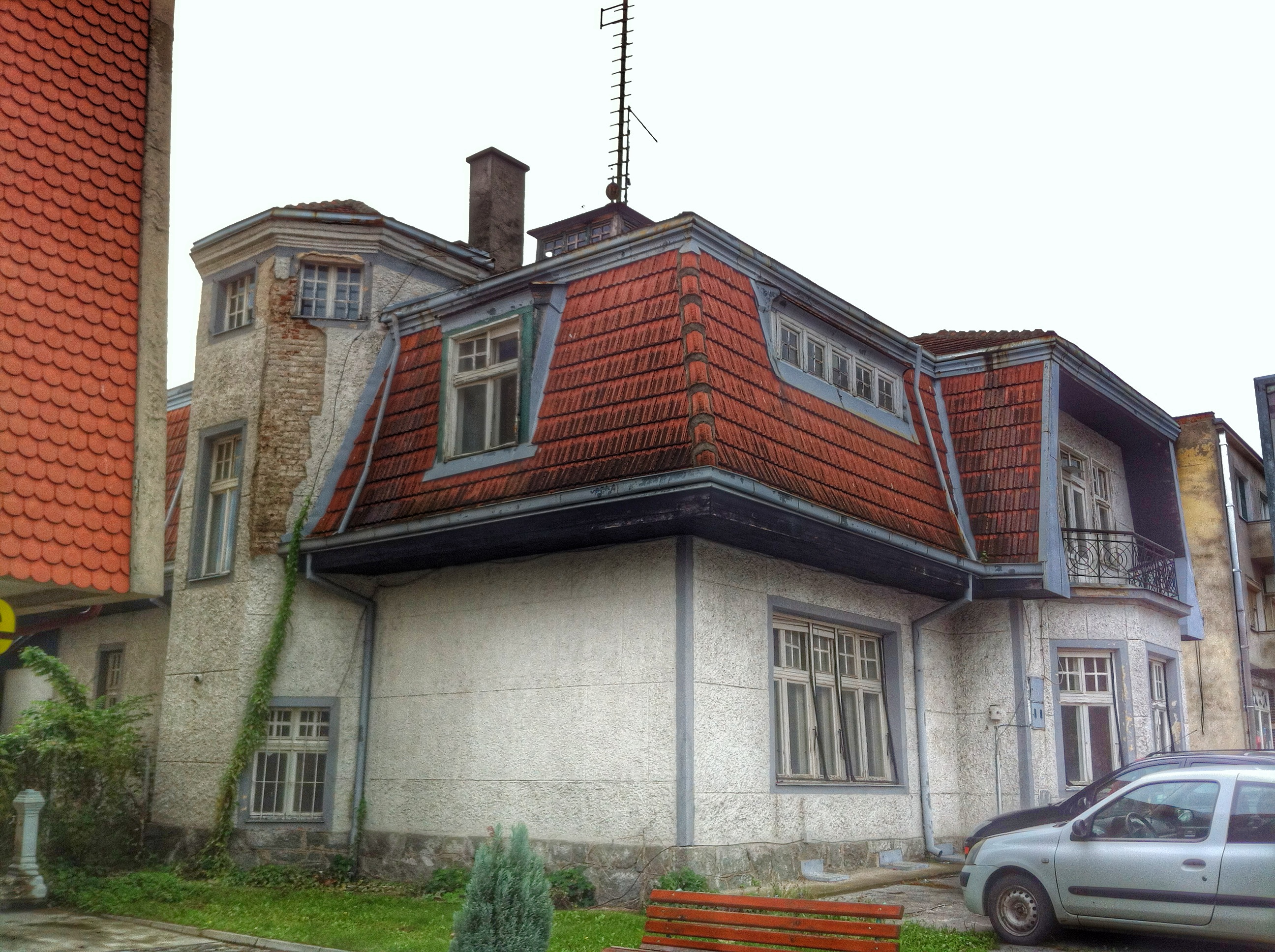 Зграда се налази у улици Милоша Великог бр.79 у Великој Плани, преко пута Општине. До скоро је ту био смештен МУП.